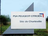 Logo à l'entrée du site